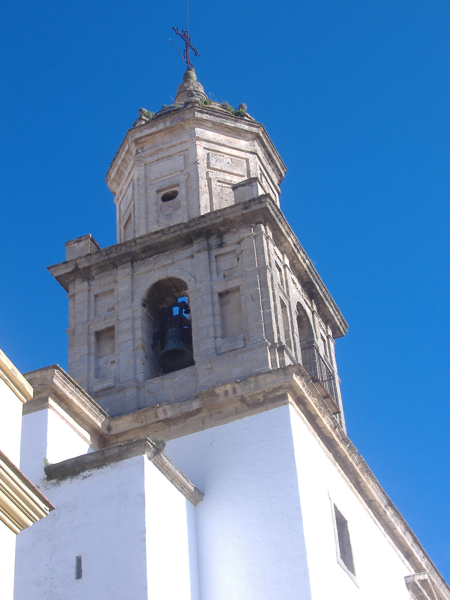 Sanúcar de Barrameda. Torre de la Caridad